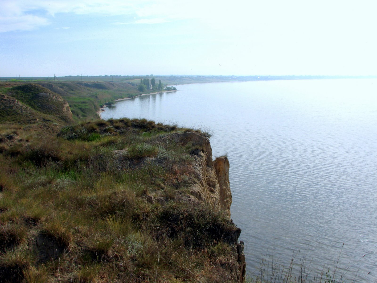 «Софіївський», Білозерський район, південно-західна околиця с. Софіївка